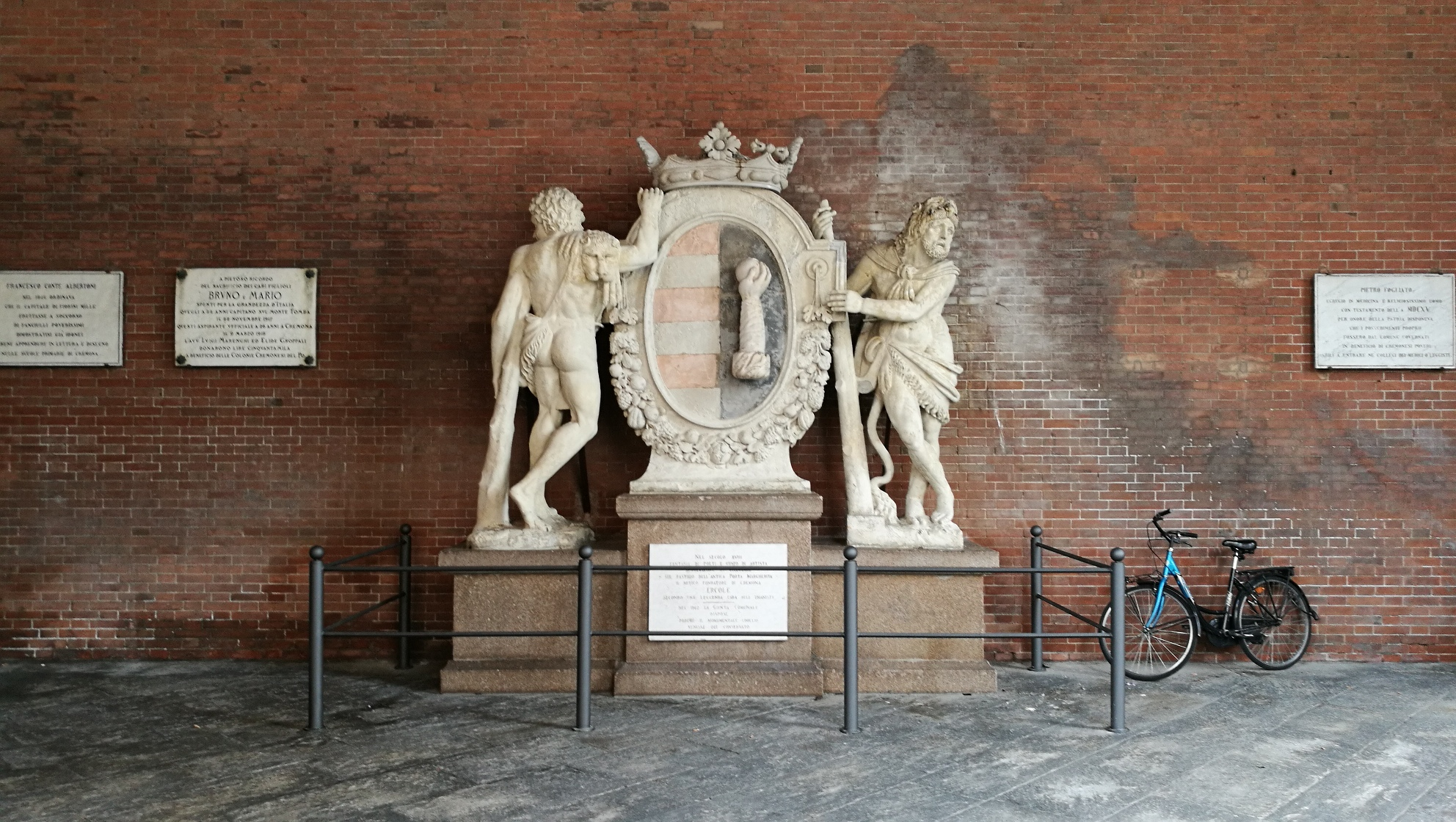 Stemma di Cremona collocato nella Loggia dei Militi proveniente dalla Porta Margherita